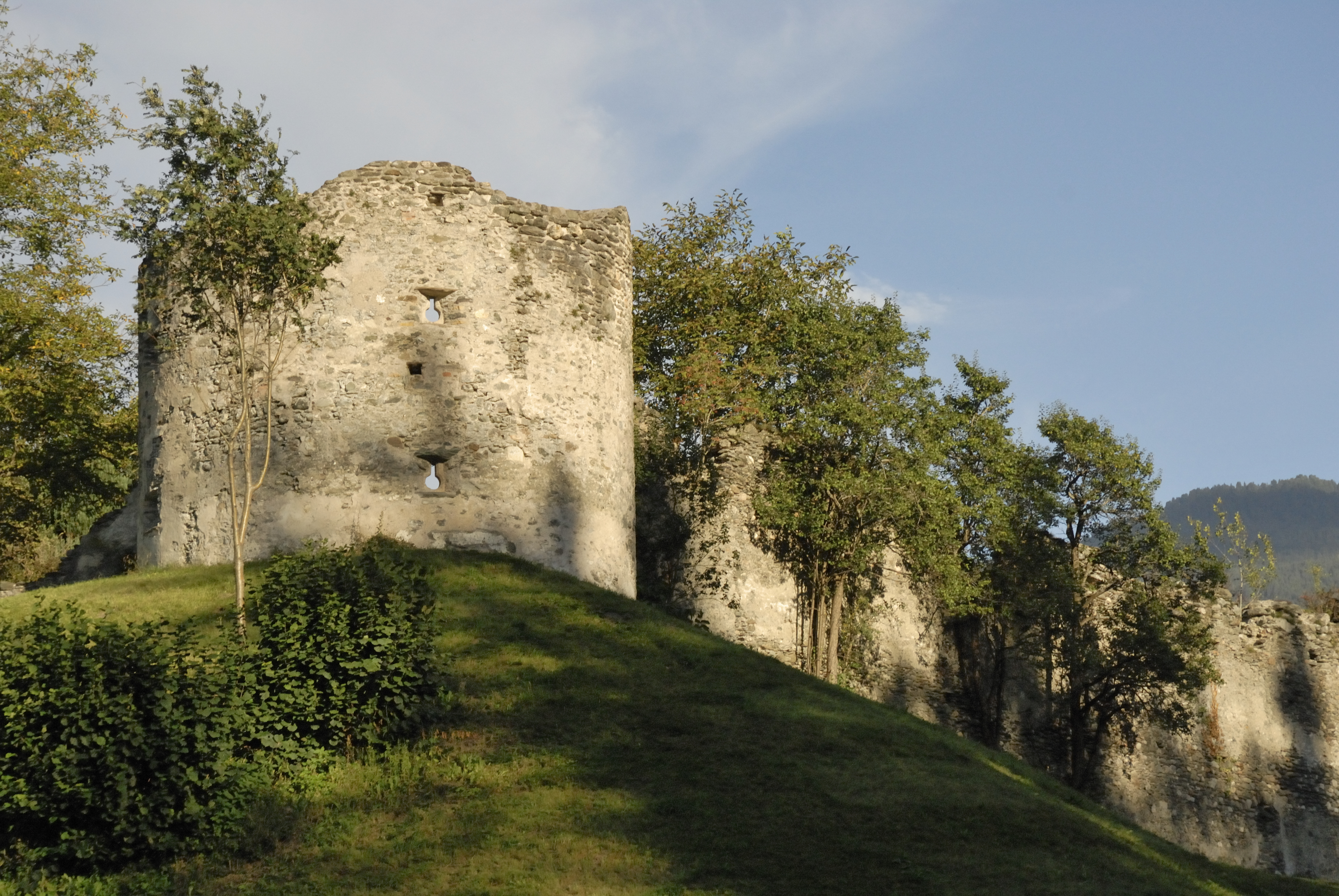 Burg Rettenberg, Kolsassberg, Tirol